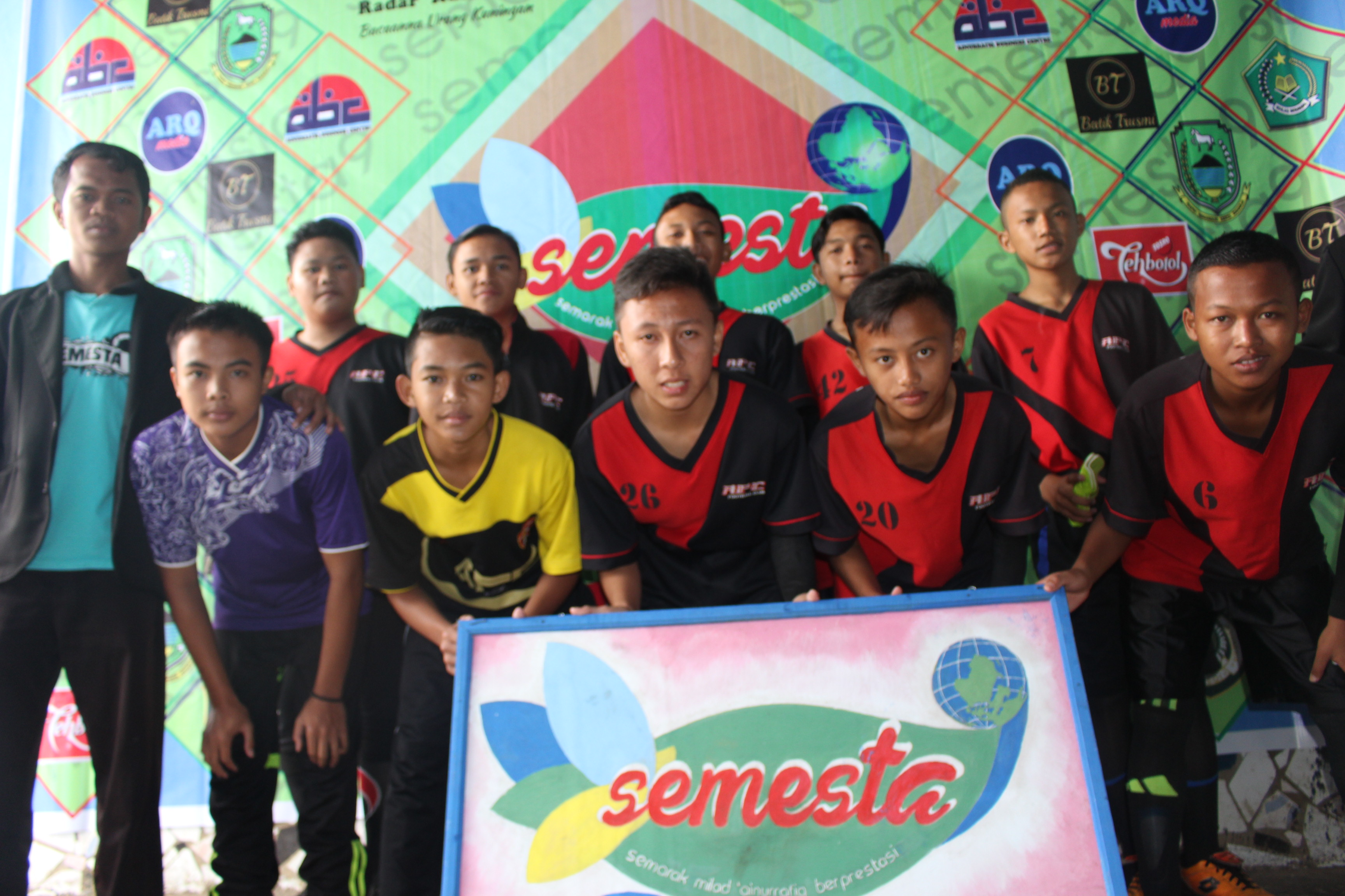 Tim Futsal Ainurrafiq FC Junior